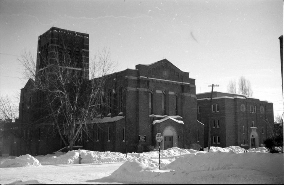 Nous voyons le temple «Wesley United Church» situé au 5964, avenue Notre-Dame-de-Grâce à Montréal.